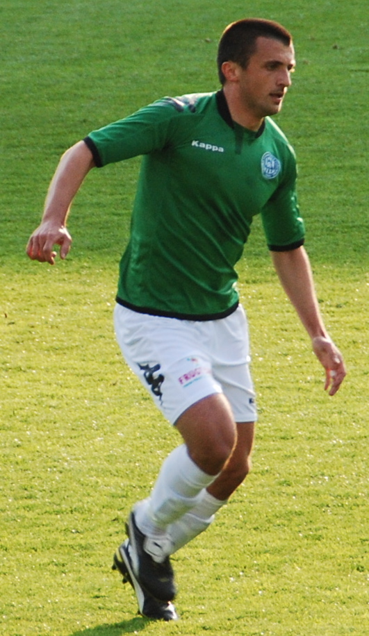 Fodboldspilleren Eldin Karisik fra Viborg FF. Her i 1. divisionskampen mod Hobro IK på Viborg Stadion.